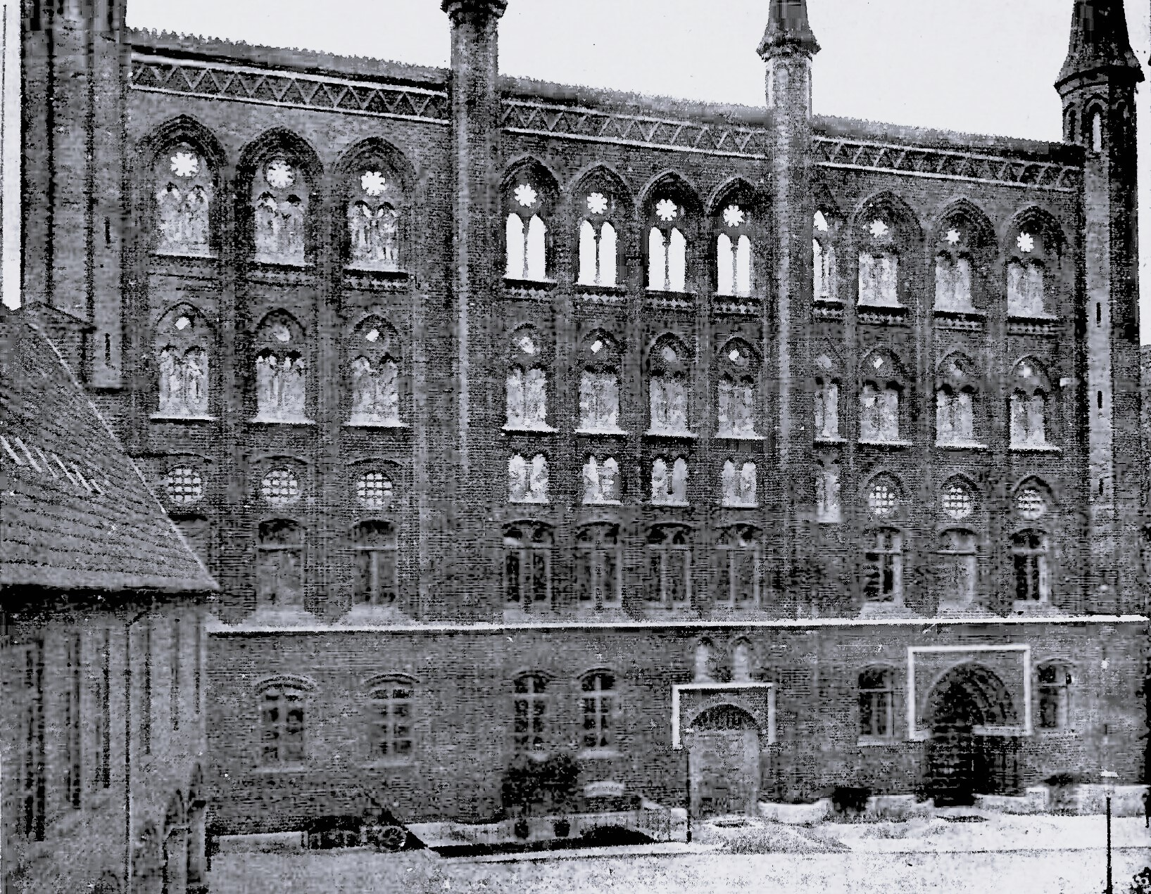 Nordfront des Rathauses mit den Bildern der Ratsherrn (1891).